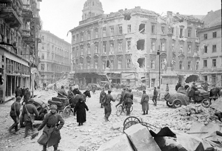 Советские бойцы в одном из освобожденных кварталов г. Будапешта